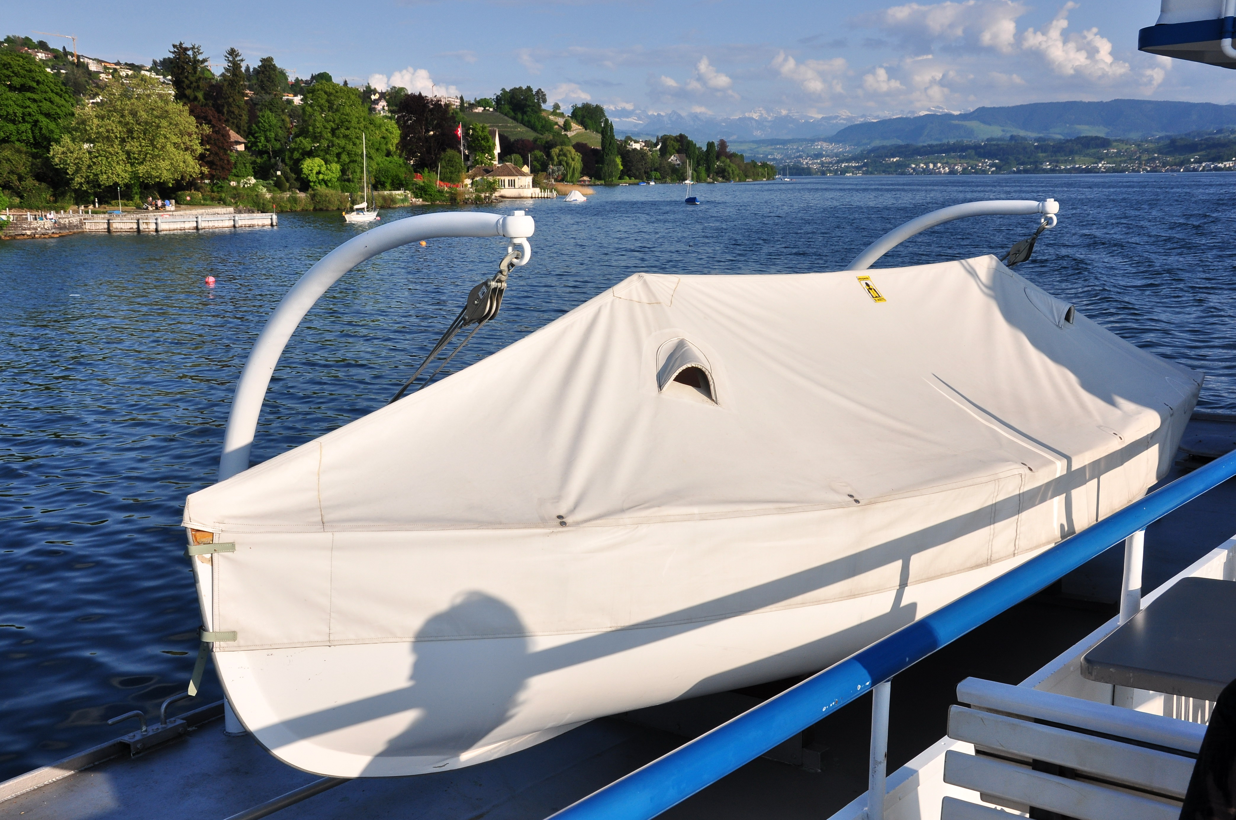 Zürichsee-Schiffahrtsgesellschaft (ZSG) paddle steamer Stadt Rapperswil